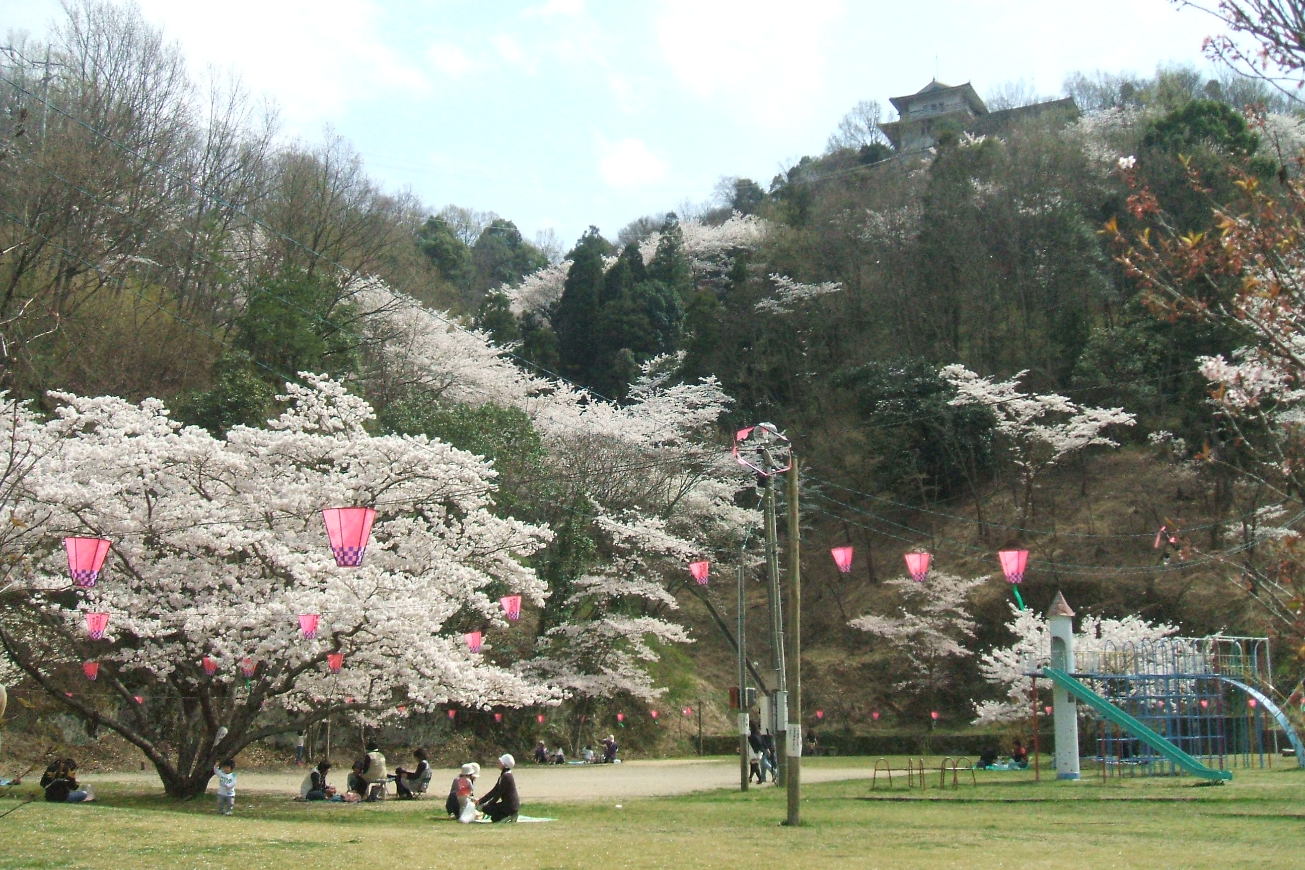 広島県福山市神辺町にある吉野山公園の様子。上にある建物は福山市神辺歴史民俗資料館である。